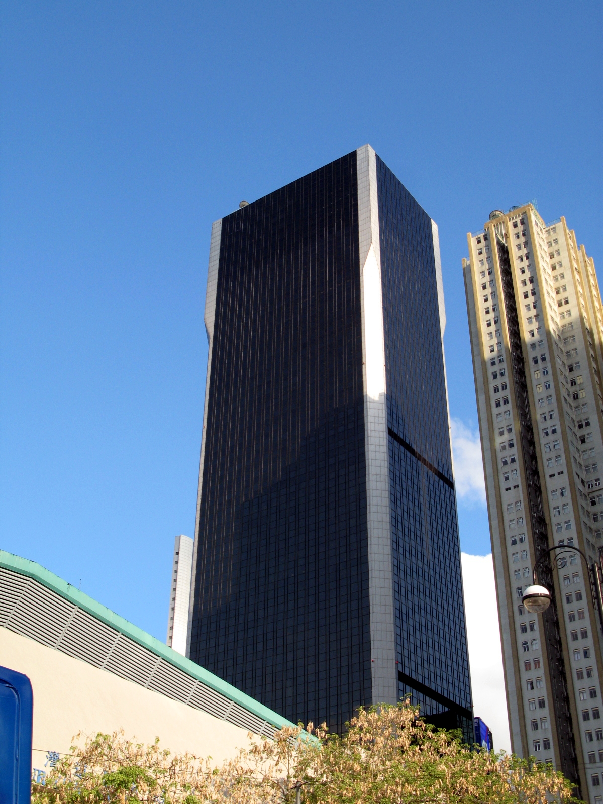 Sun Hung Kei Centre in Hong Kong